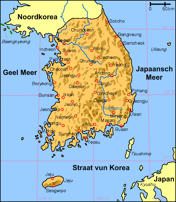 Koort vun Süüdkorea